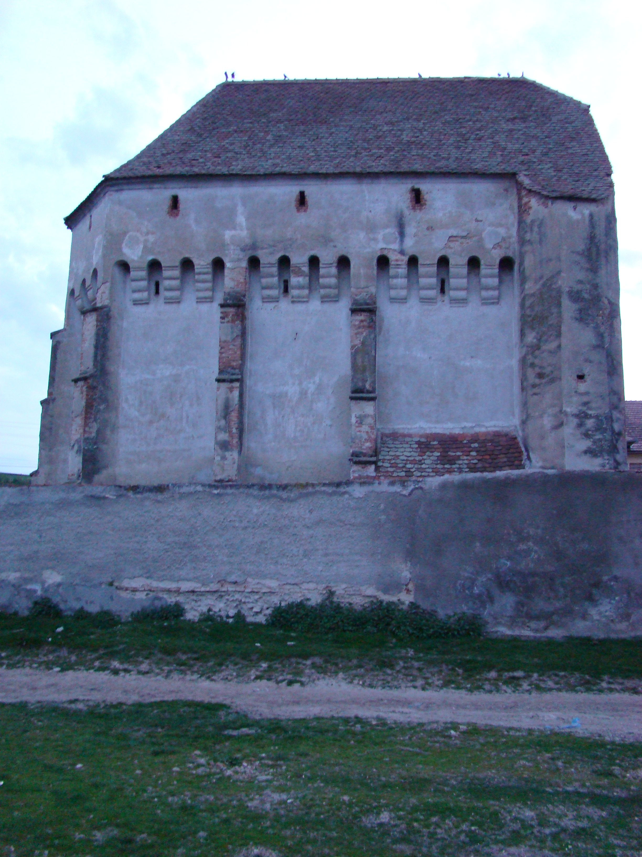 Wehrkirche in Boz (Bußd), Alba, Siebenbürgen, RumänienRomână: Biserica fortificată din Boz (Bußd), Alba, Transilvania, România